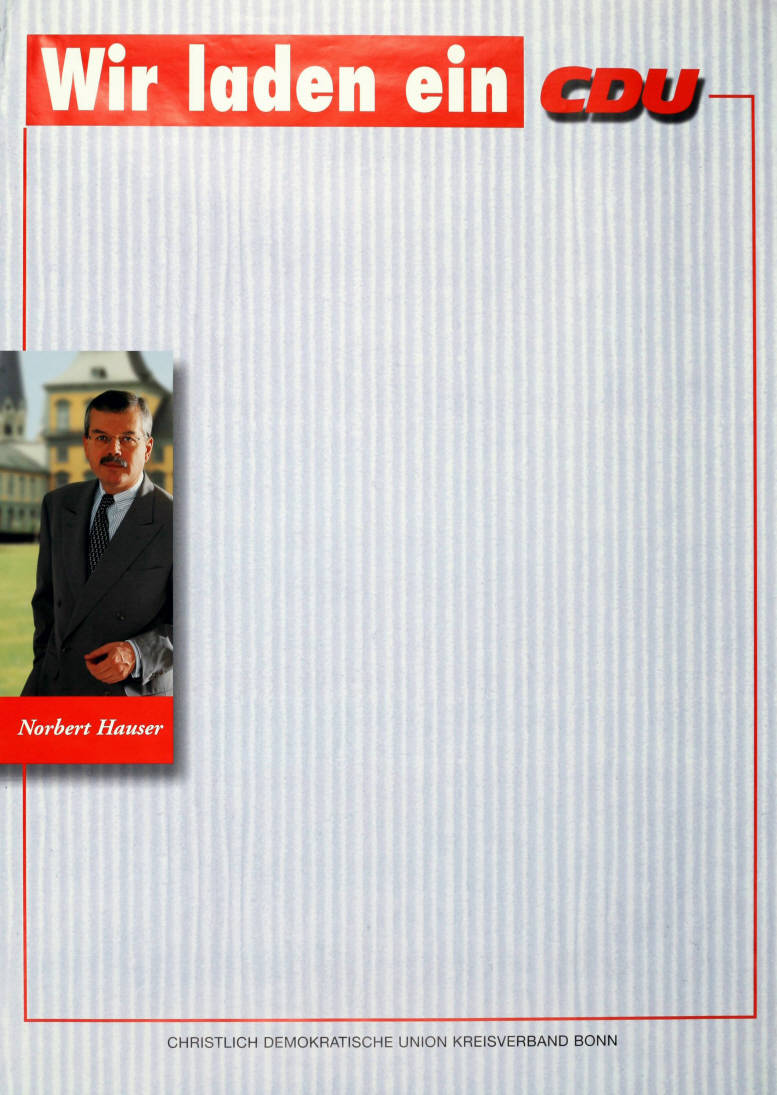 Wir laden ein CDU Norbert Hauser Christlich Demokratische Union Kreisverband Bonn Abbildung: Foto Plakatart: Blanko-/Ankündigungsplakat Objekt-Signatur: 10-001: 5035 Bestand: Plakate zu Bundestagswahlen (10-001) GliederungBestand10-18: Plakate zu Bundestagswahlen (10-001) » Die 14. Bundestagswahl am 27. September 1998 » CDU » Ankündigungsplakate Lizenz: KAS/ACDP 10-001: 5035 CC-BY-SA 3.0 DE